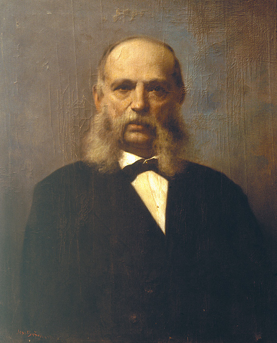 Ivan Mažuranić